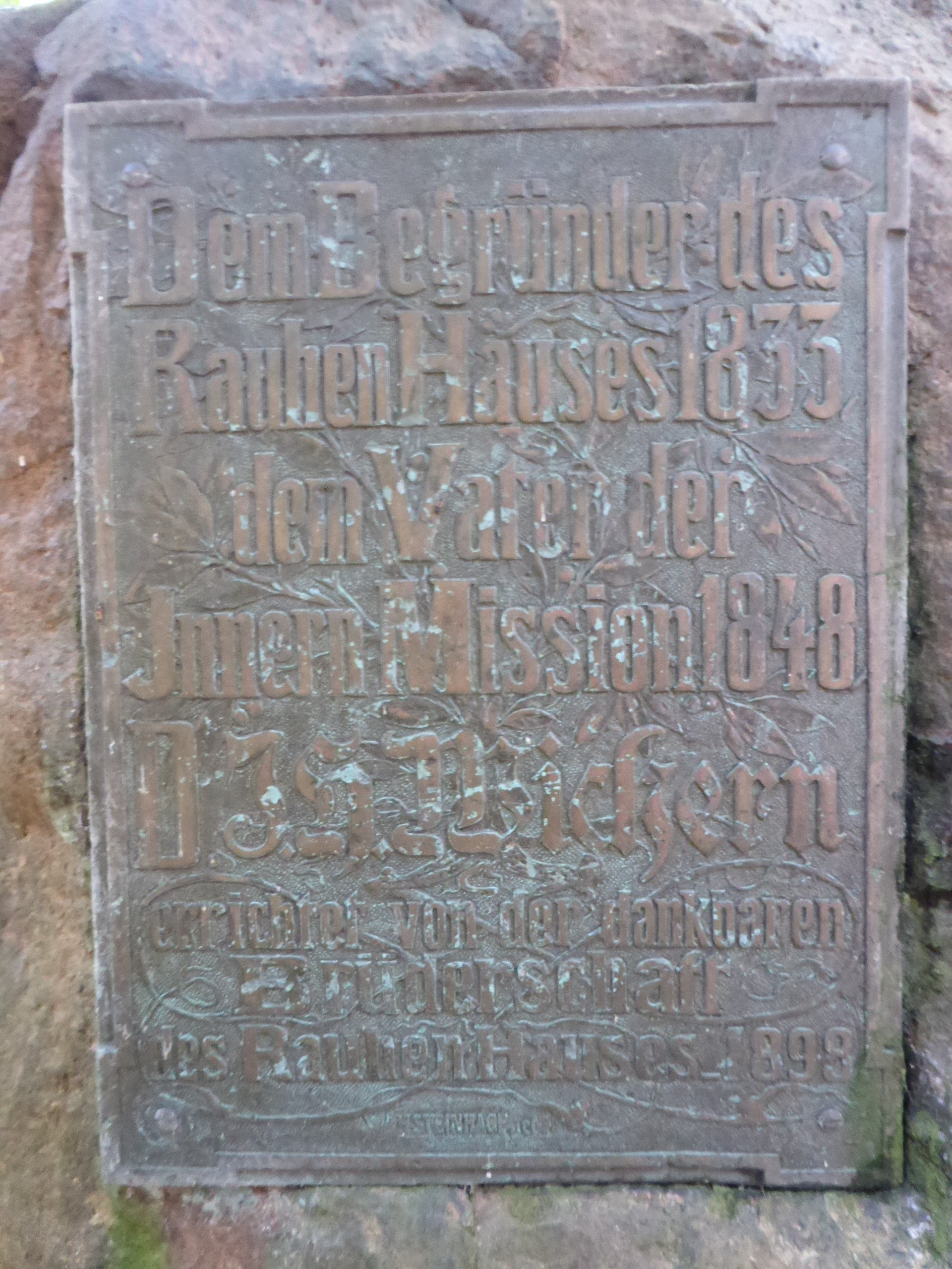 Wichernstein auf dem Stiftungsgelände des Rauhen Hauses (1898)